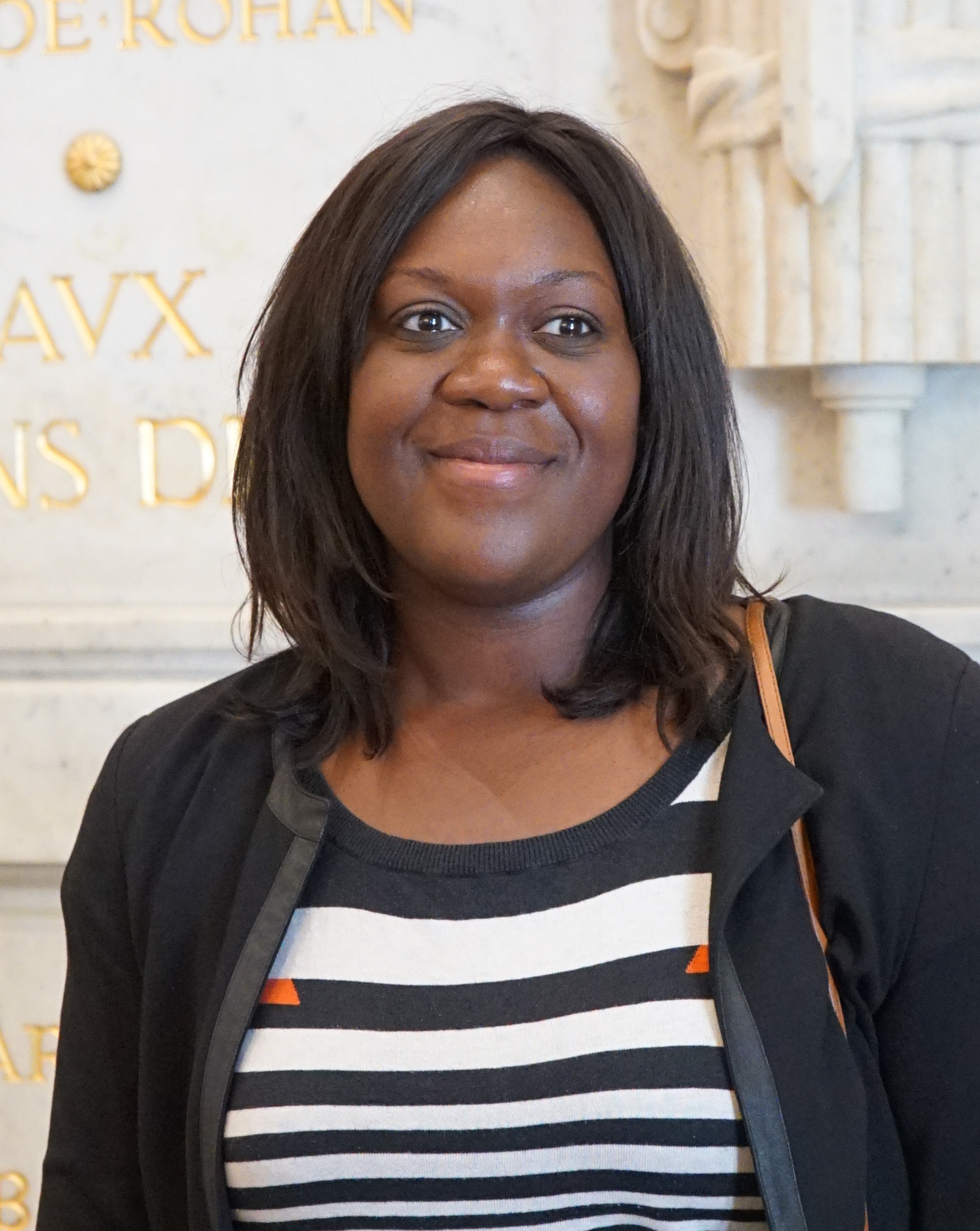 la députée salle des quatre colonnes.